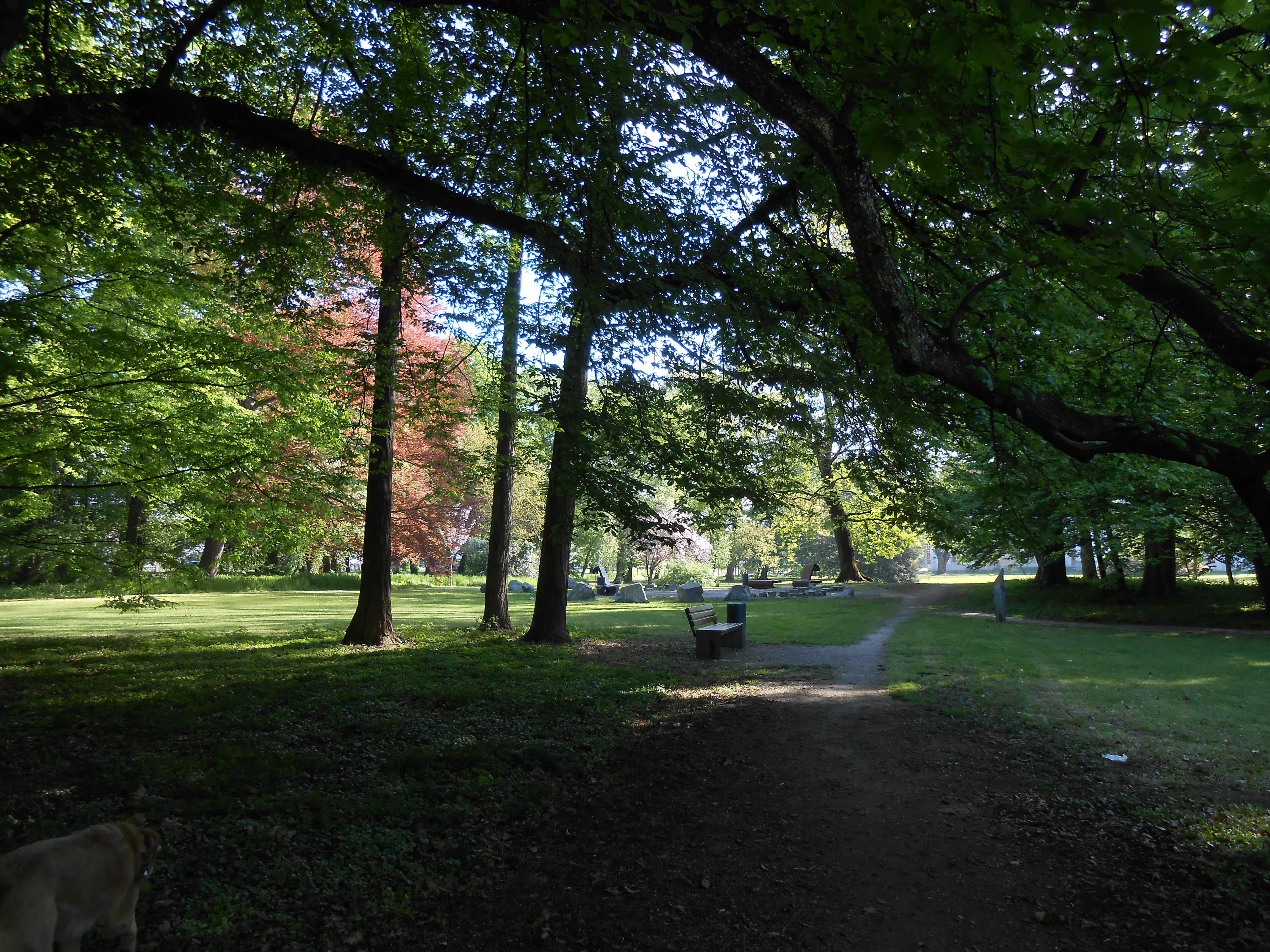 Eden od pogledov mestnem parku v Murski Soboti